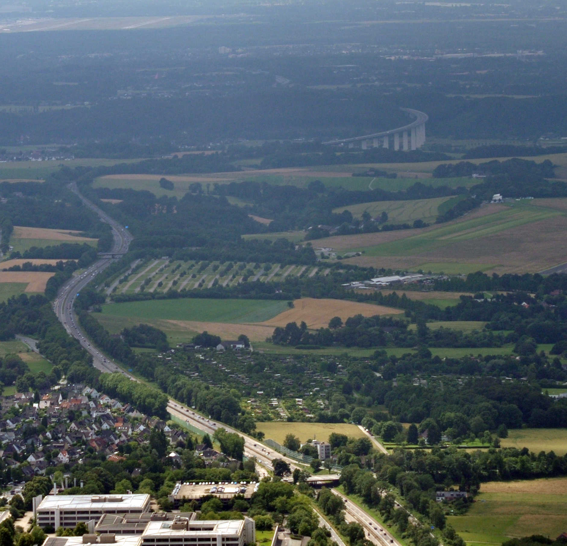 Die A52 aus ca. 600 m Höhe bei Essen (unten im Bild). Hinten ist die Ruhrtalbrücke zu sehen. Oben links ist der Flughafen Düsseldorf und rechts in der Mitte der Flugplatz Mülheim an der Ruhr zu erkennen. Blick nach Westen.